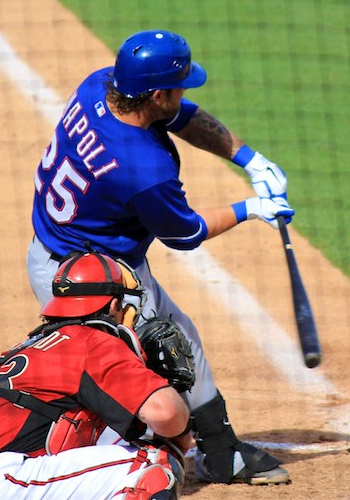 Mike Napoli